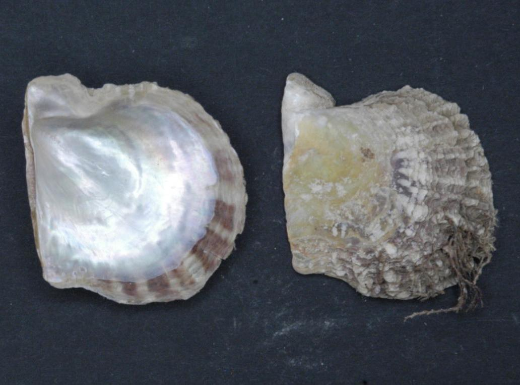 Pinctada imbricata radiata (Leach, 1814)